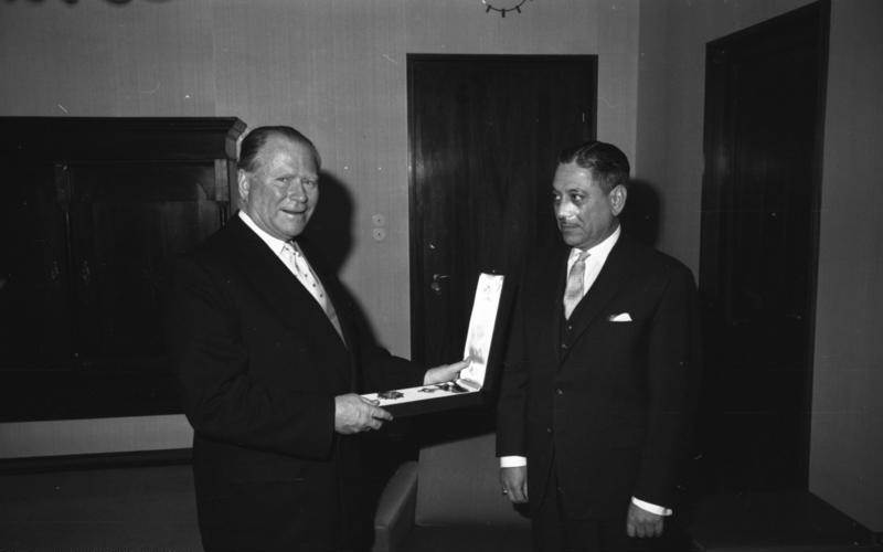 Der Botschafter von El Salvador, L. Barrientos, überreicht Orden an Staatssekretär van Scherpenberg